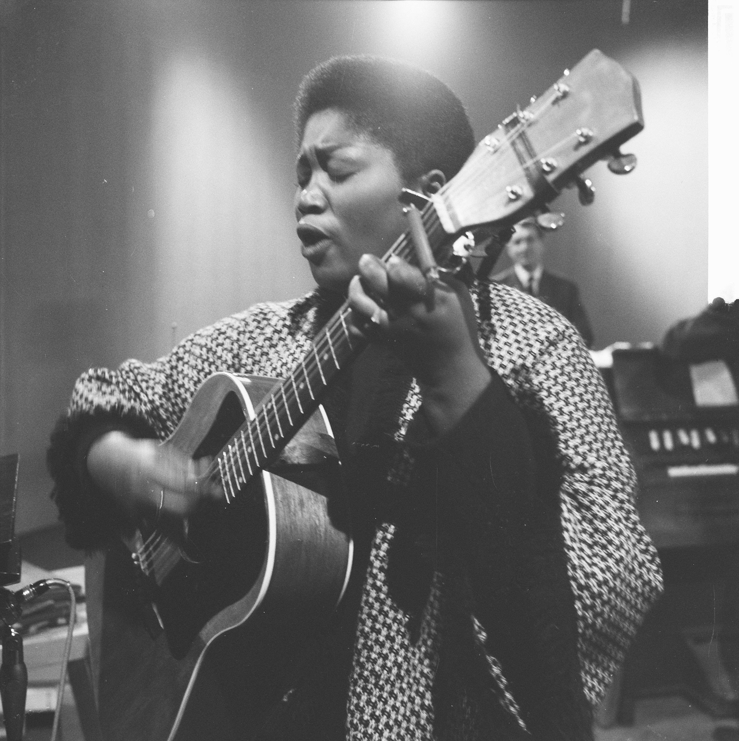 Collectie / Archief : Fotocollectie Anefo Reportage / Serie : [ onbekend ] Beschrijving : Odette, gospelzangeres in Amsterdam. In TV-studio Datum : 4 december 1961 Locatie : Amsterdam, Noord-Holland Trefwoorden : TV-studios, gospelzangeressen Persoonsnaam : Odetta Fotograaf : Nijs, Jac. de / Anefo Auteursrechthebbende : Nationaal Archief Materiaalsoort : Negatief (zwart/wit) Nummer archiefinventaris : bekijk toegang 2.24.01.03 Bestanddeelnummer : 913-2560 Reacties Geplaatst door Musiclady op 25 september 2017 - 15:24. AVRO Televisieprogramma 'Muziek Mozaïek' van Willem O' Duys; te gast zangeres Odetta. Amerikaanse zangeres van folksongs, blues, jazz en gospelliederen. Volledige naam: Odetta Felious.